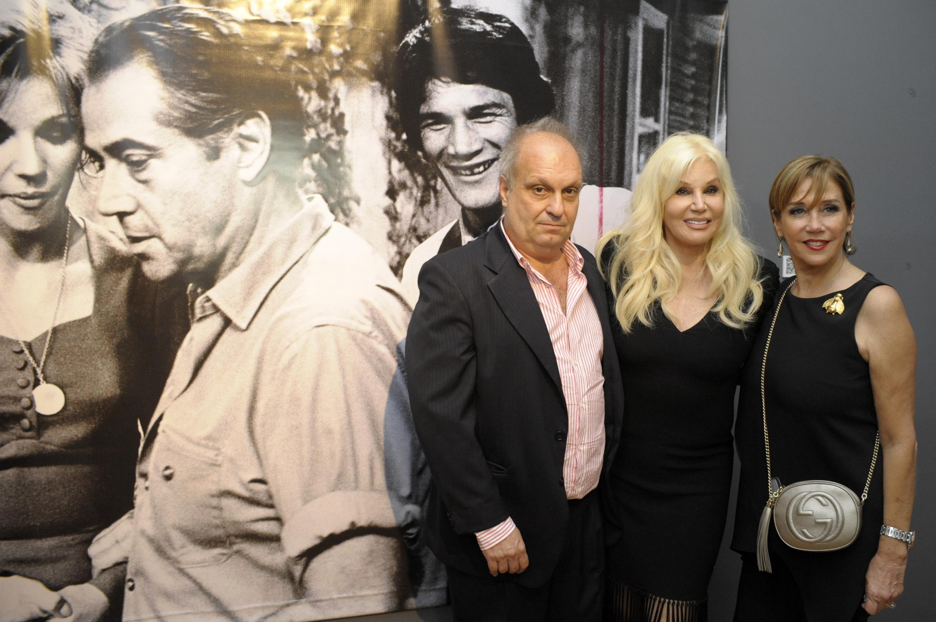 Hernán Lombardi, Susana Giménez y Marcela Tinayre en la apertura de una muestra sobre La Mary en el Museo del Cine "Pablo C. Ducrós Hicken".